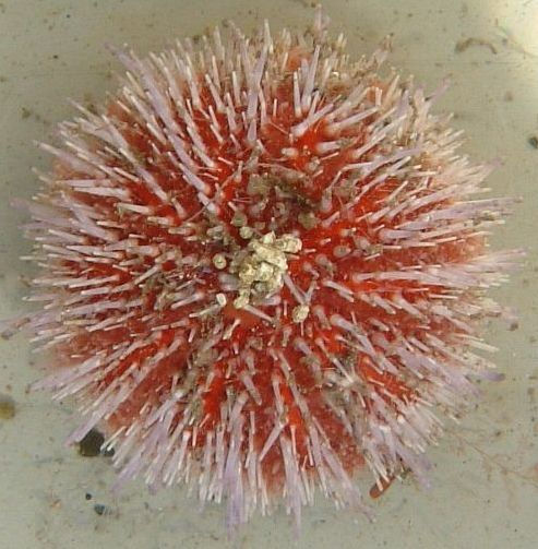 Svabergsjøpiggsvin Echinus esculentus med lyse pigger på rød bunn, munnen i bunnen og endetarmsåpningen på toppen.Template:Byline